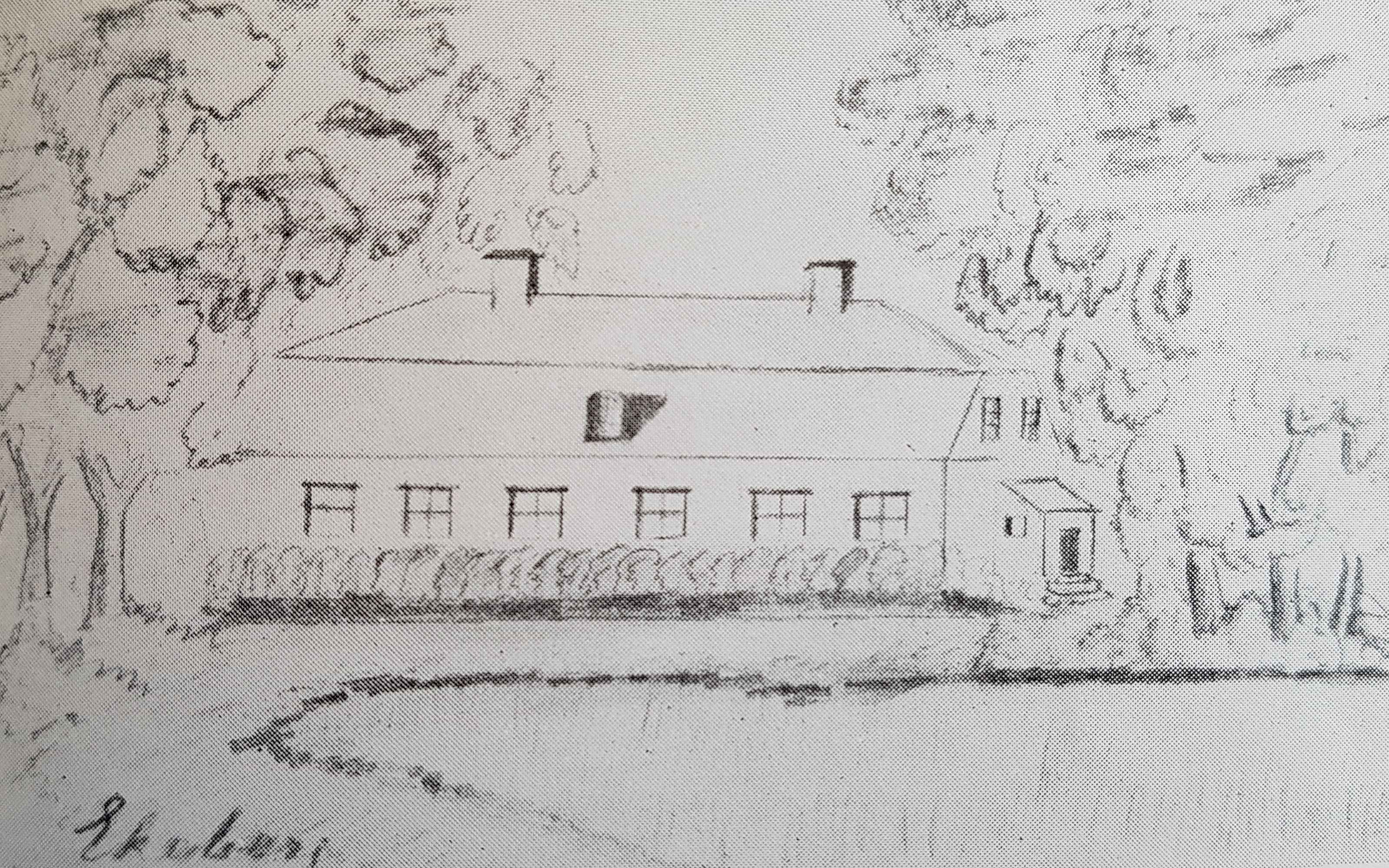 Ekeberg teckning av August von Schantz ca 1865